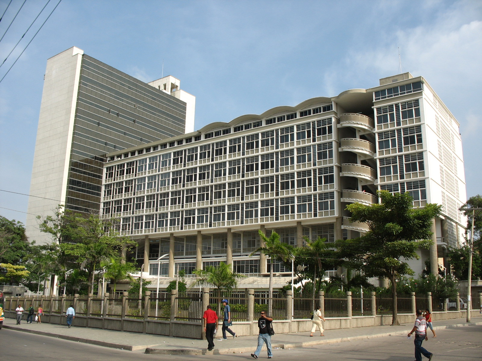 Edificios Nacional y Lara Bonilla, Barranquilla